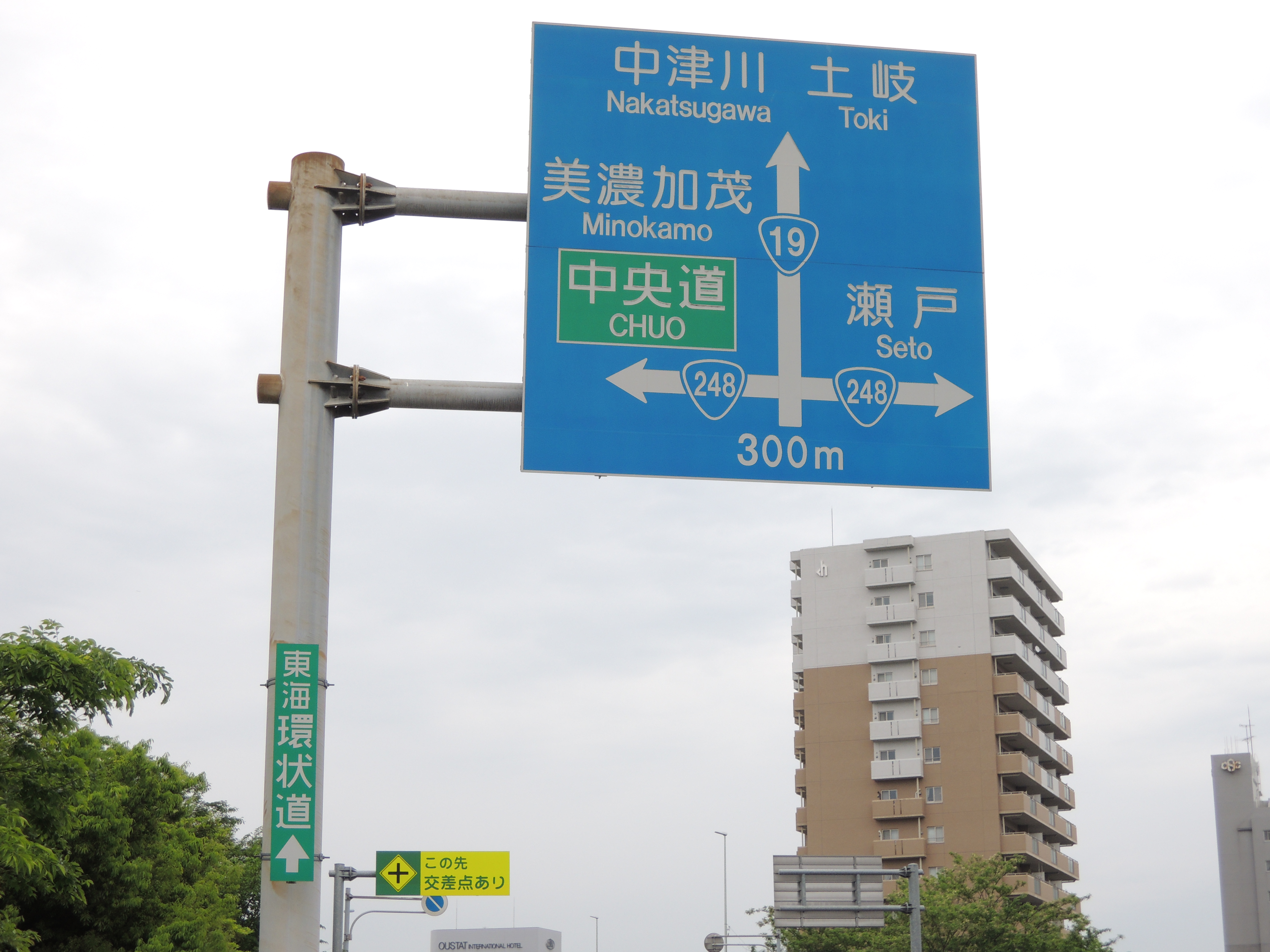 東海環状自動車道 （土岐南多治見インターチェンジ）予告標識（国道19号線 下り 岐阜県多治見市太平町）